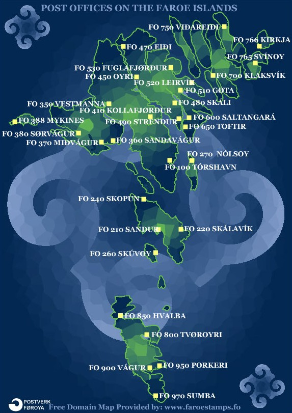 Føroyskt: Postnummur í Føroyum - posthús